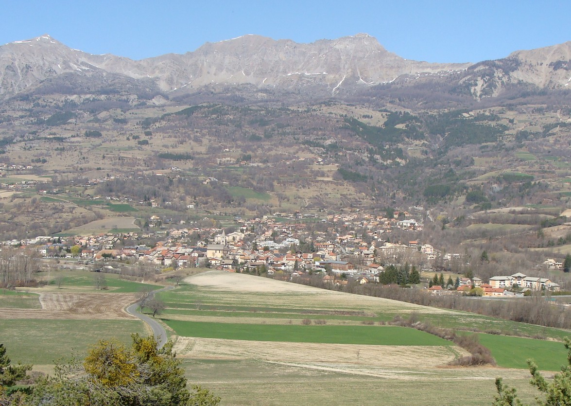 Chorges (Hautes-Alpes), vue générale depuis le sud. Au fond, le Piolit et les Parias.